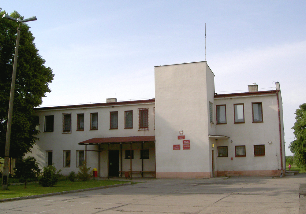 Dołhobyczów, Poland • Urząd Gminy/ Commune Council